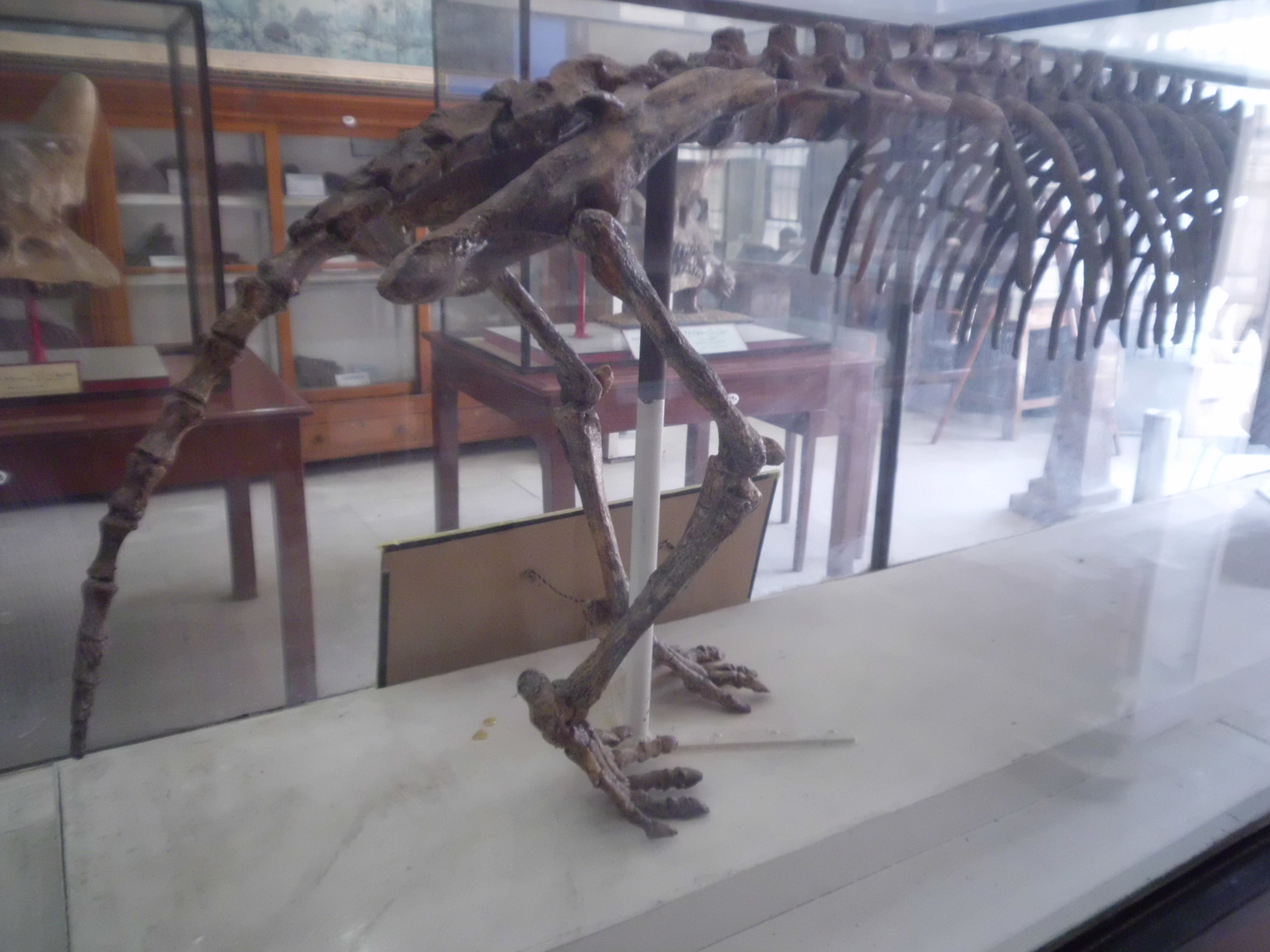 موريثيريوم هو احد الثدييات المنقرضة وقد وجدت حفرياته بمنطقة قصر الصاغة التابعة لعصرالايوسين بمنطقة الفيوم ويمتاز بارتفاع صغير من 50 الى 70 سم وجسم طويل واطراف قصيرة ودقيقة وحيوان الموريثيريوم يعتبر من اسلاف الفيلة وابقار البحر وكان اكل للعشب ويعيش بالقرب من مصبات الانهار ويقضي جزء كبير من حياته في الماء